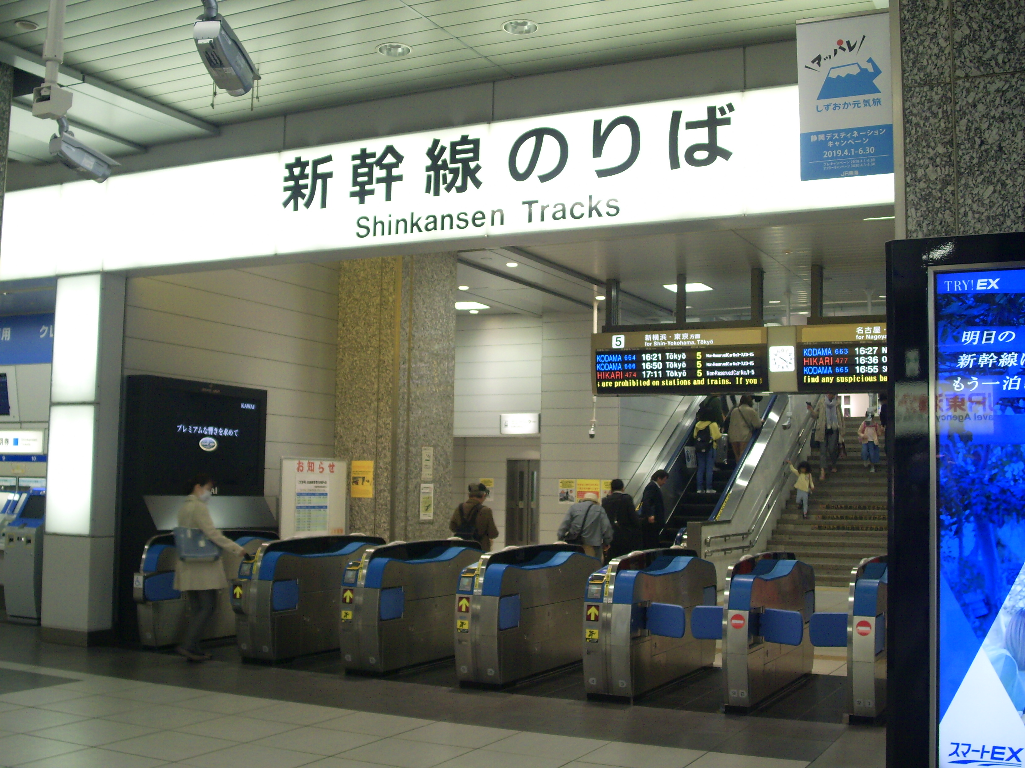 浜松駅新幹線改札口 ㊟カメラを起動すると日付機能が出荷時のものに初期化されるため、ファイル履歴の投稿日時とメタデータの原画像データの生成日時が異なります（本概要欄の下記日付が撮影日）